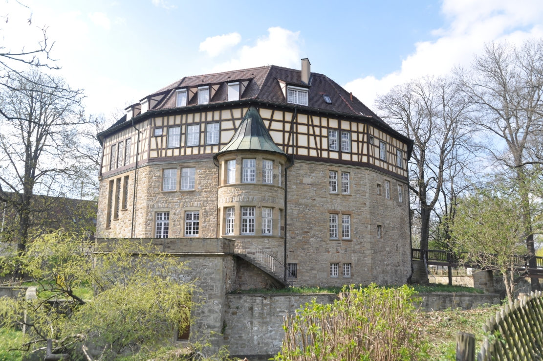 Sachsenheim April 2012